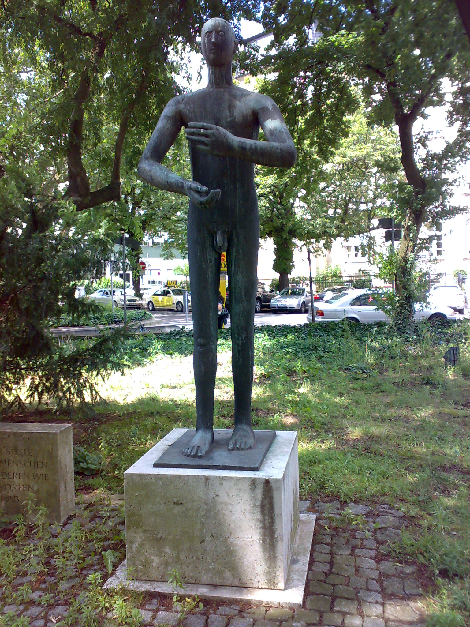 Das Bronzedenkmal von Hans Mettel im Frankfurter Westend, Bockenheimer Landstraße 42 /Ecke Freiherr-vom-Stein-Straße wurde am 31. August 1957 eingeweiht. Die Gedenkstelle besteht aus der abgebildeten überlebensgroße Jünglingsfigur und einem Gedenkstein, auf dem "Hyperions Schicksalslied" eingemeißelt ist. Hölderlin lebte 1796 bis 1798 als Hauslehrers bei der Bankiersfamilie Gontard im Haus Bockenheimer Landstraße 42.